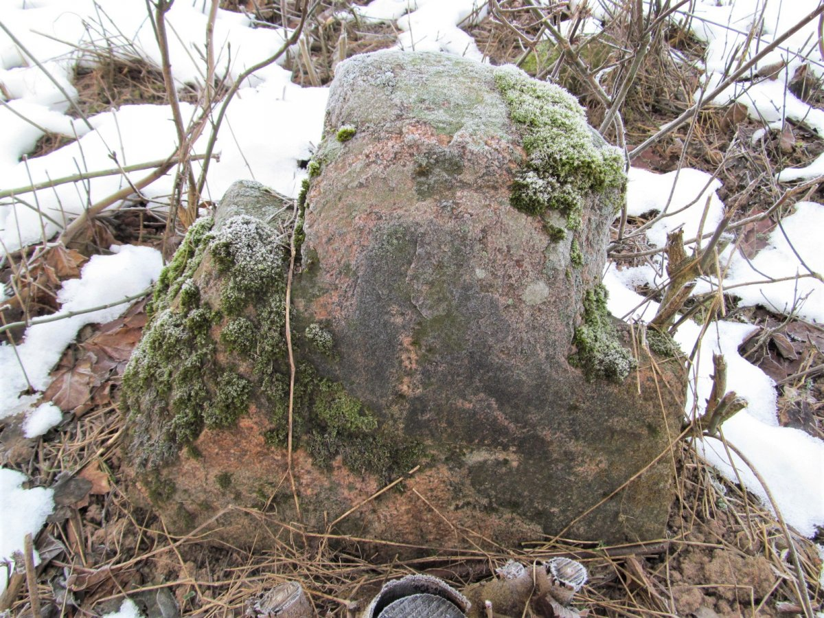 Ленькі. Могілкі